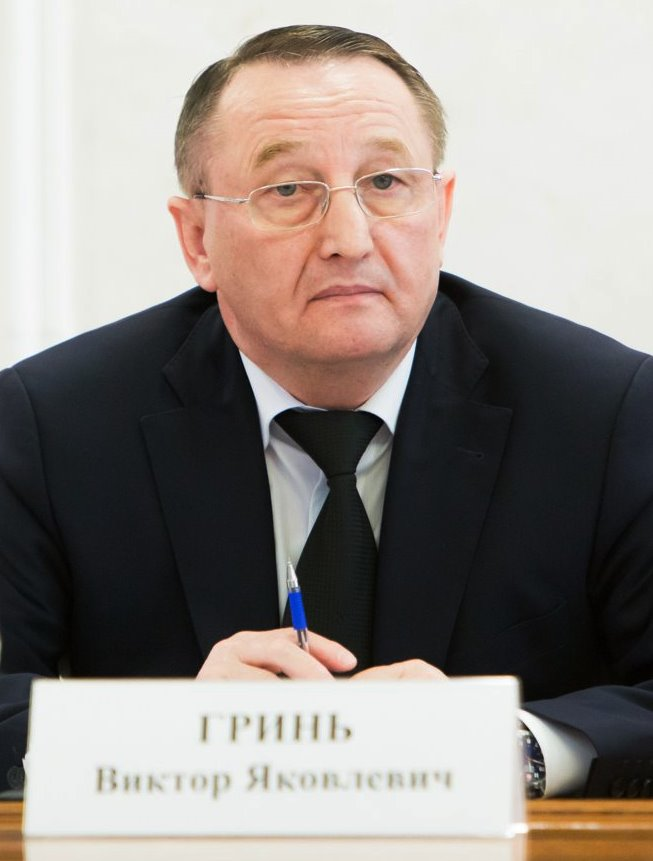 Виктор Яковлевич Гринь (род.1951) — российский юрист